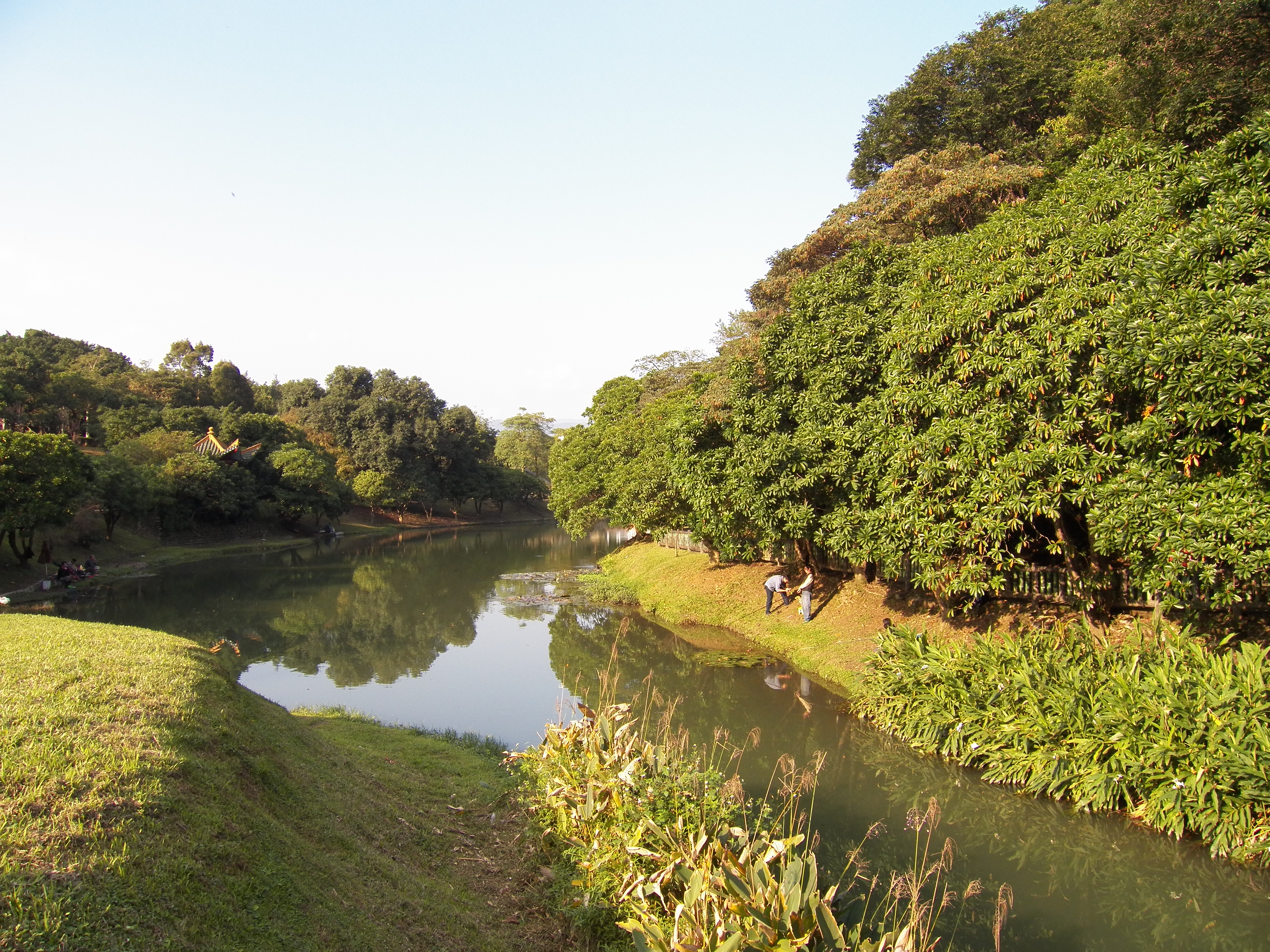 中文（台灣）: 南港公園調洪池南端。